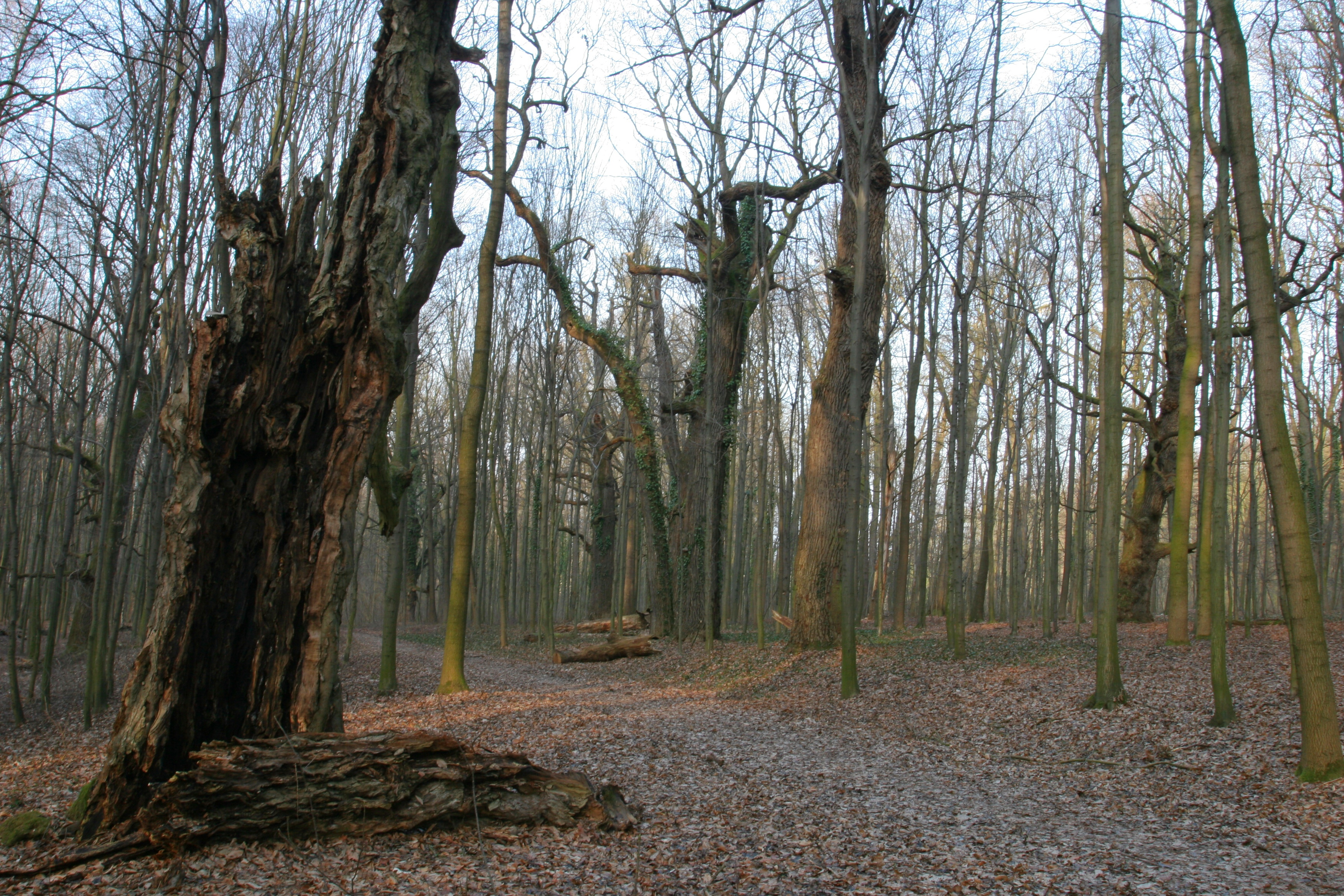 Choltická obora s torzy velikánů